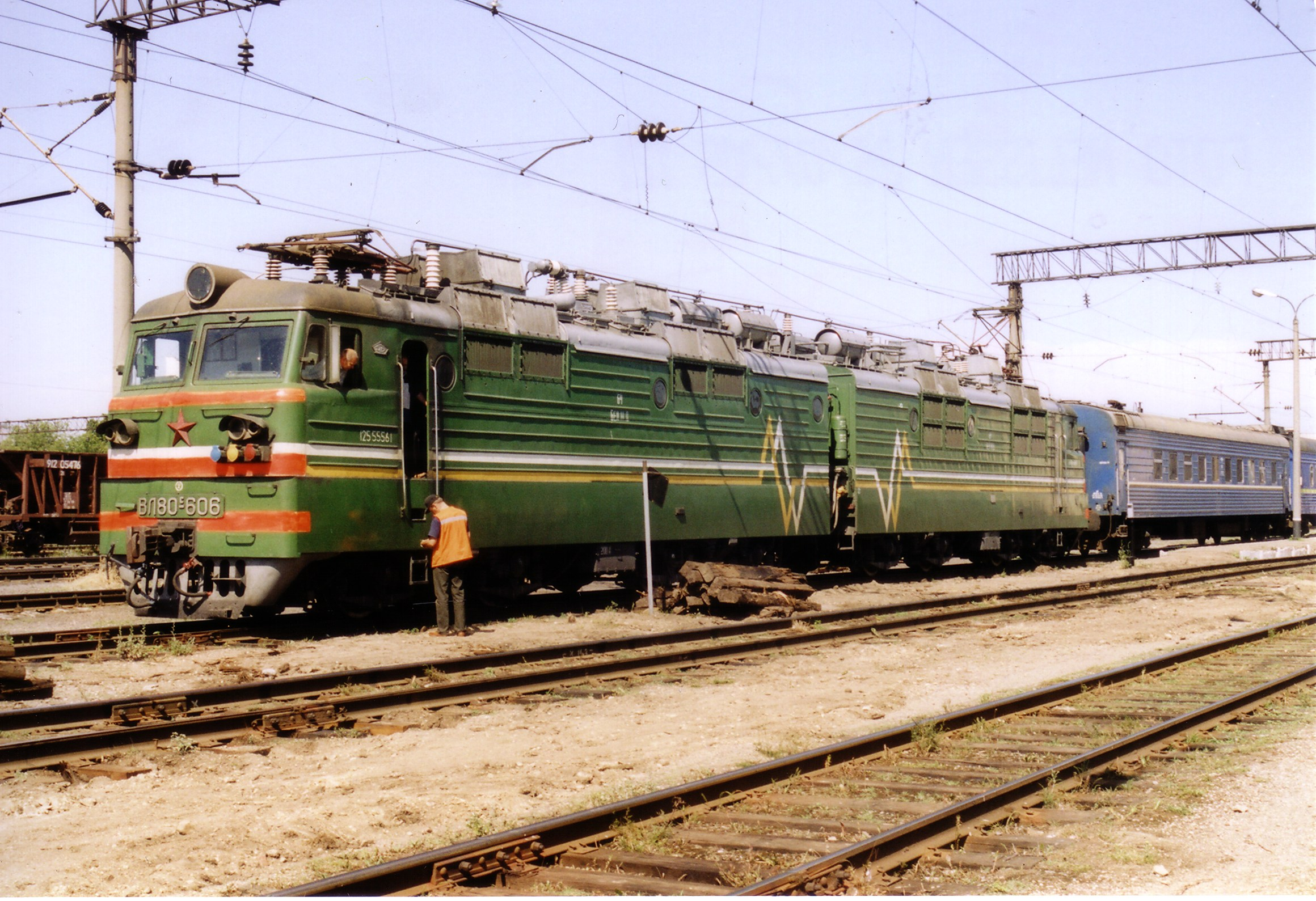 VL80 in Brest, Belarus